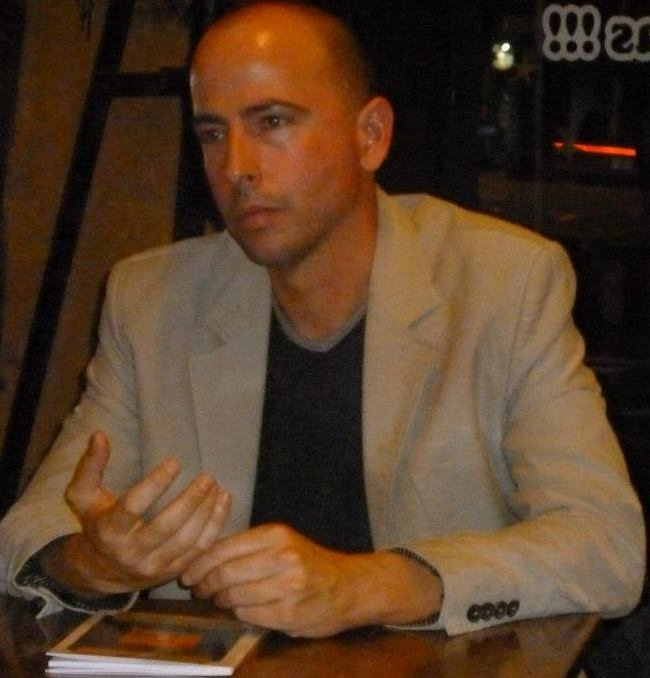 foto del autor en feria del libro lectura en Argentina